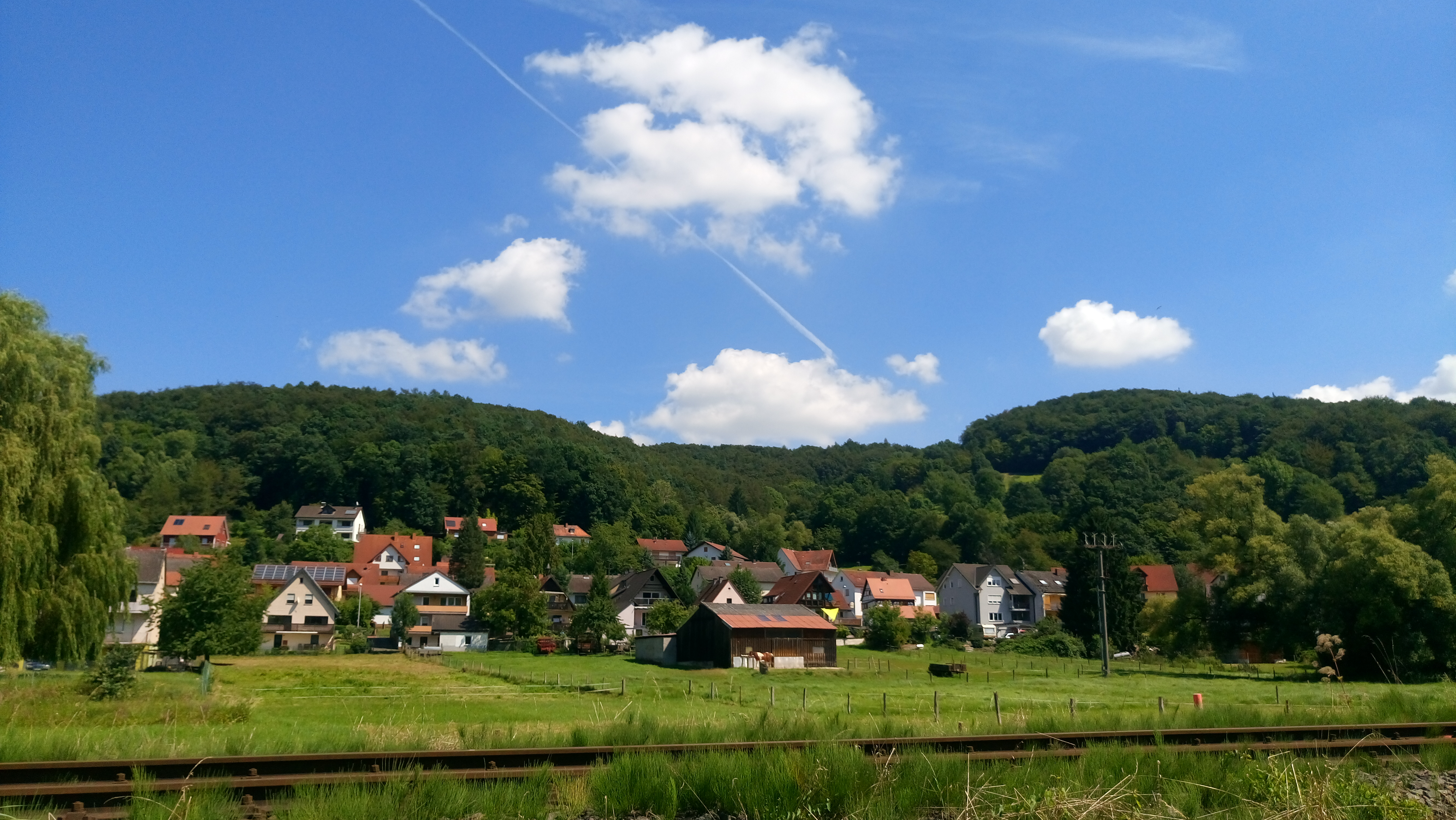 Das Dorf Niedersteinbach mit den Bergen Herrenberg (links) und Steinküppel (rechts) im Hintergrund